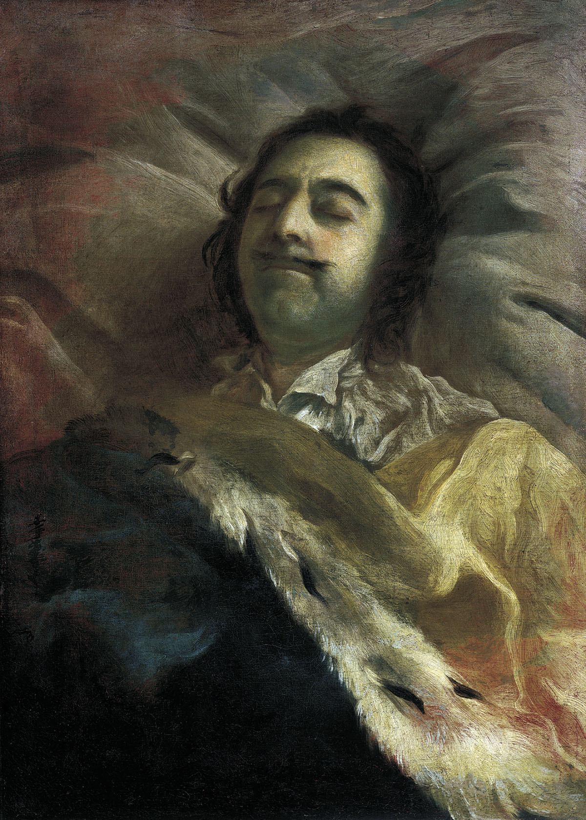 Петр I на смертном ложе